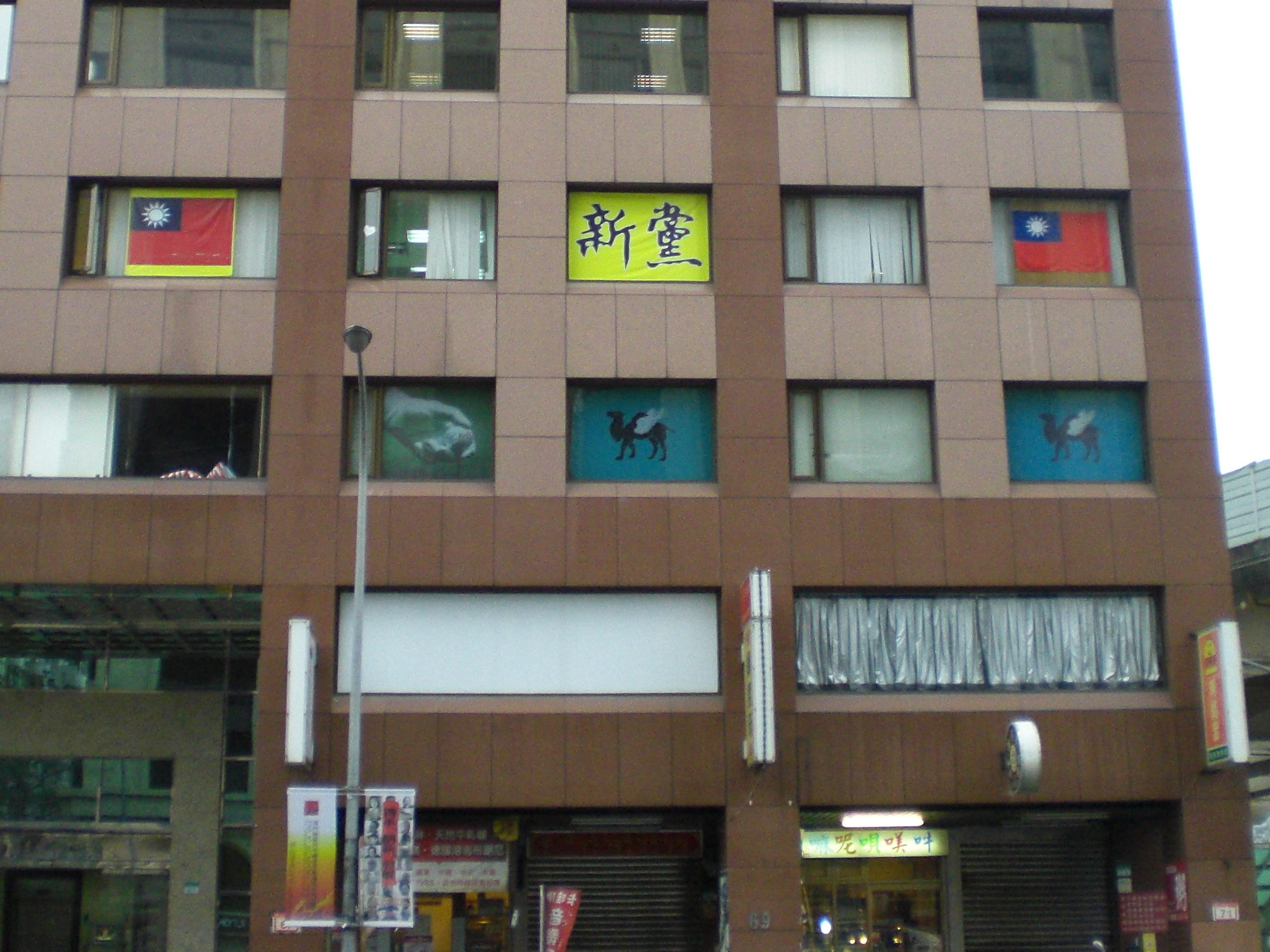 新黨全國委員會，位於臺北市松山區光復南路65號4樓（佳華建設合麗大樓），外牆玻璃窗展示新黨黨旗與中華民國國旗。